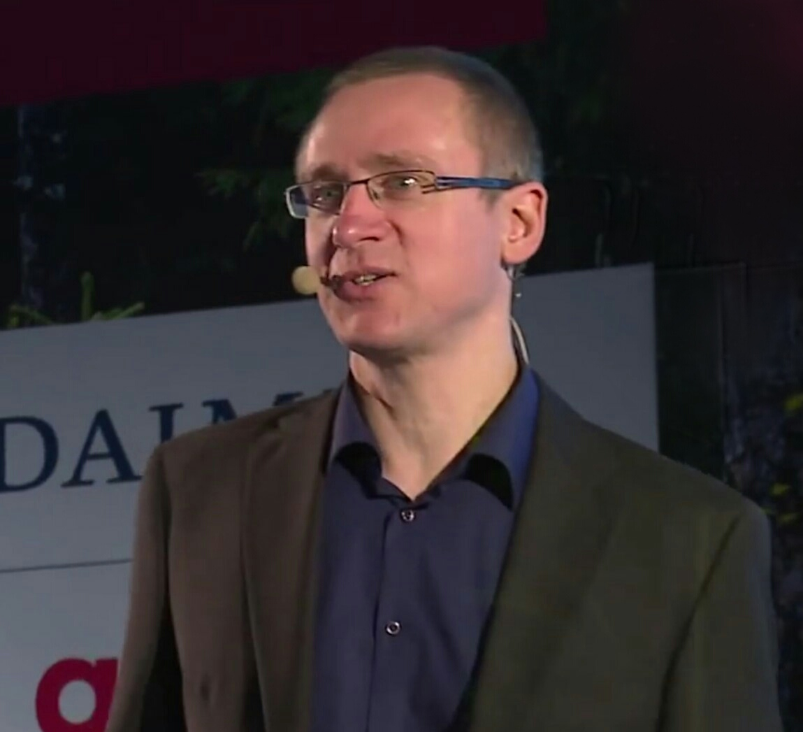 Find out more at: Georg Wurth vom Deutschen Hanfverband hat mit Hilfe von facebook & Co 1 Millionen Euro gewonnen. Wie mit diesem Geld die Legalisierung vom Cannabis in Deutschland voran getrieben werden soll, erfahrt ihr hier. Georg Wurth Creative Commons Attribution-ShareAlike 3.0 Germany (CC BY-SA 3.0 DE)